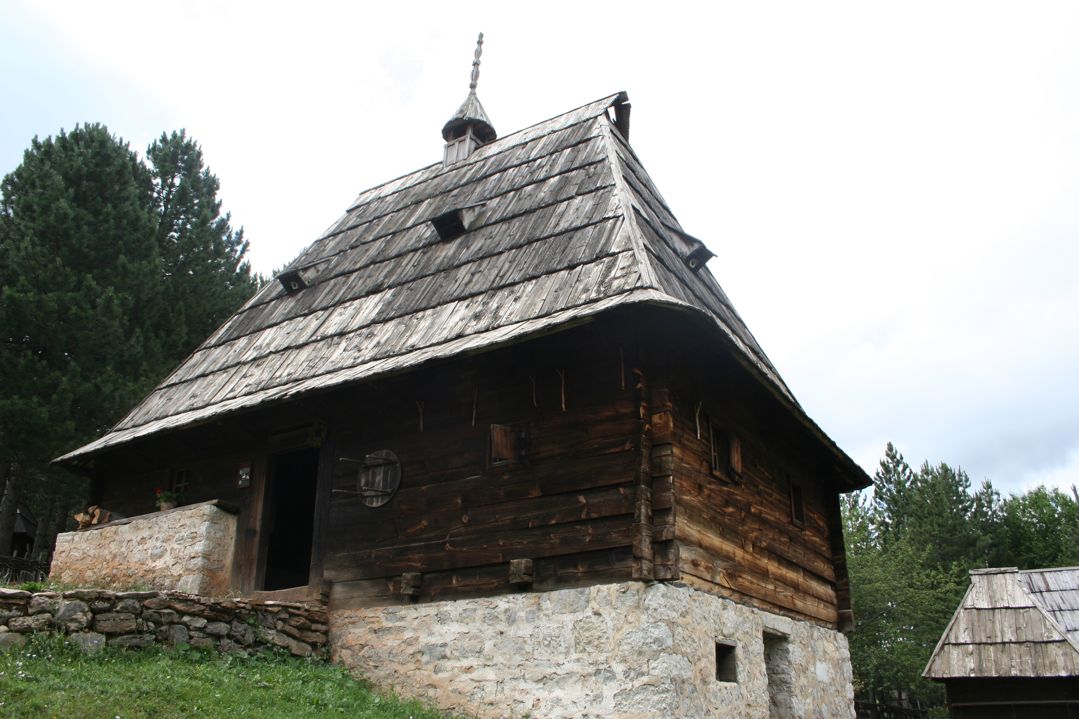 Muzej na otvorenom "Staro selo" Sirogojno